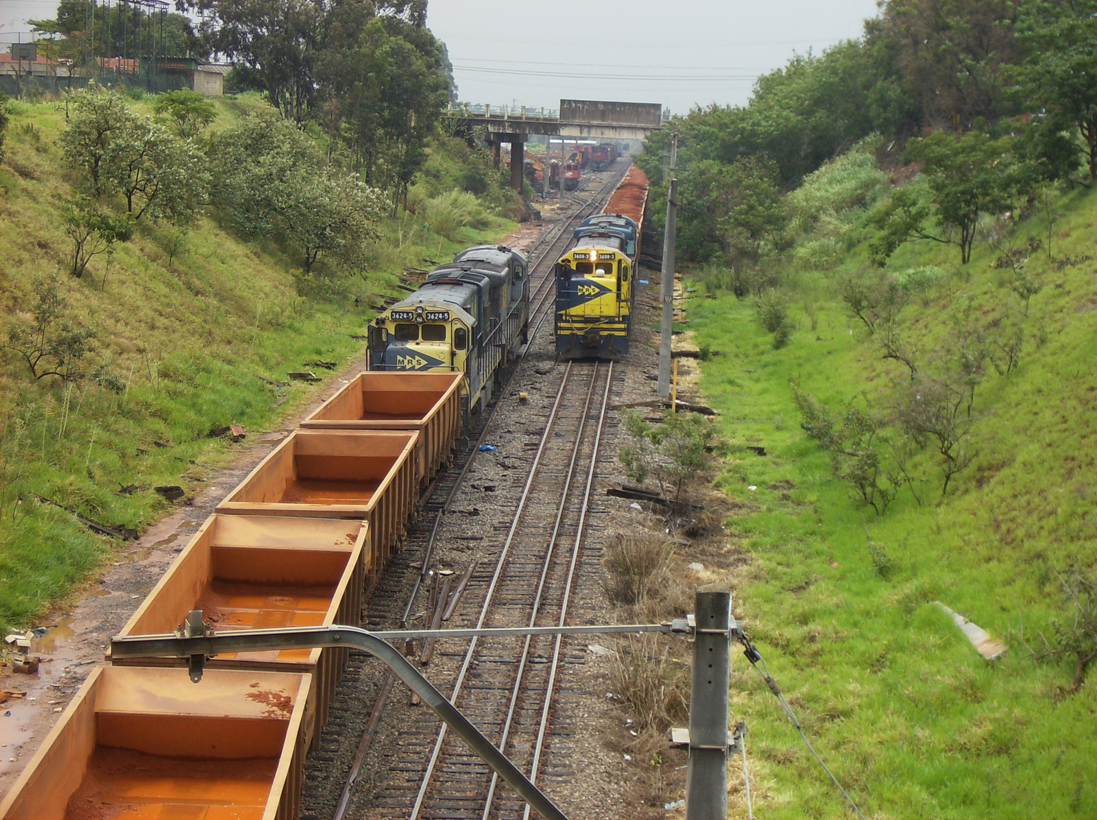 Comboios em cruzamento no pátio da Estação Ferroviária de Itu - Variante Boa Vista-Guaianã km 201.